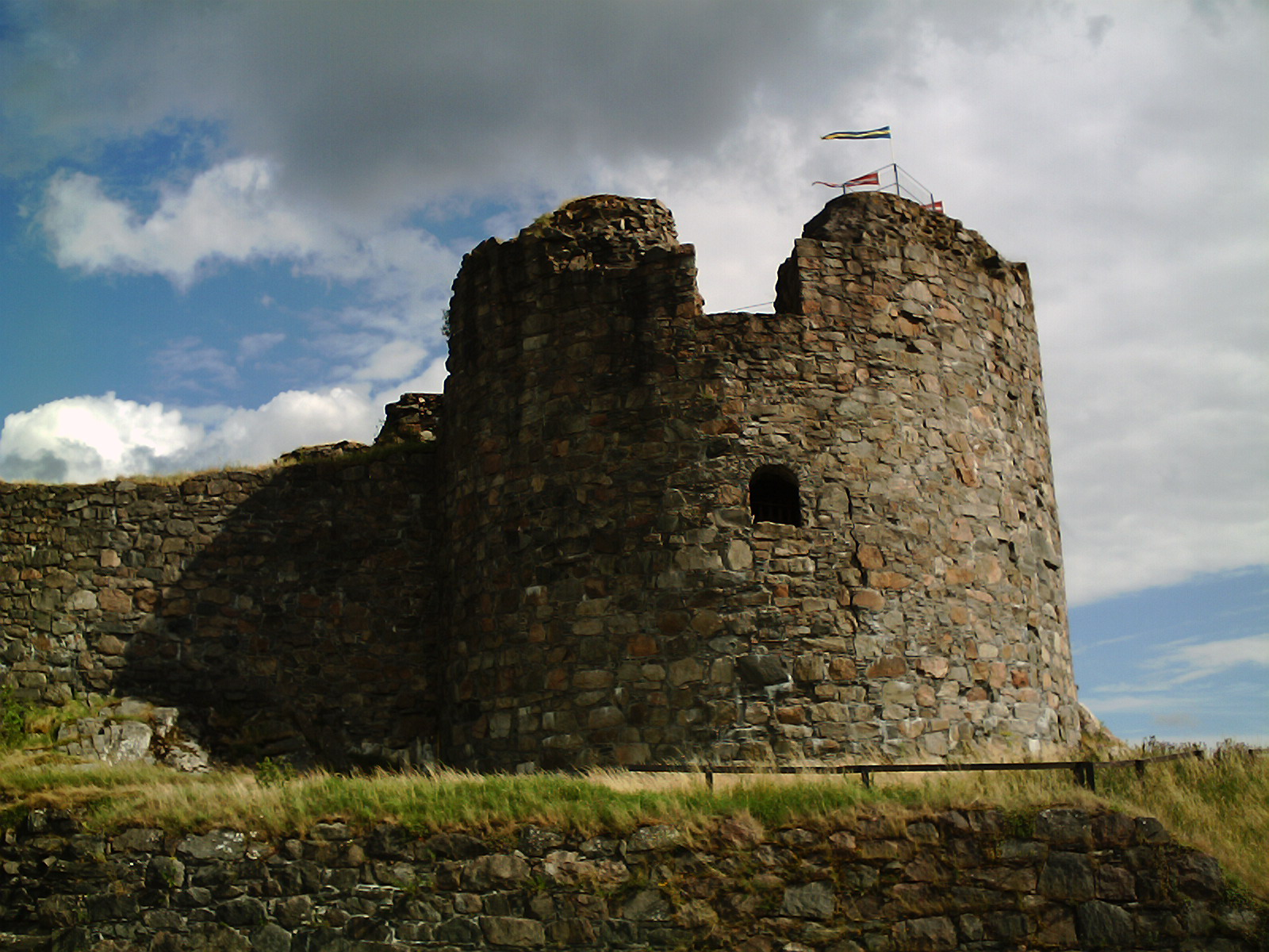 Turm „Mors mössa“ (dt.: „Mutters Mütze“) der Festung Bohus